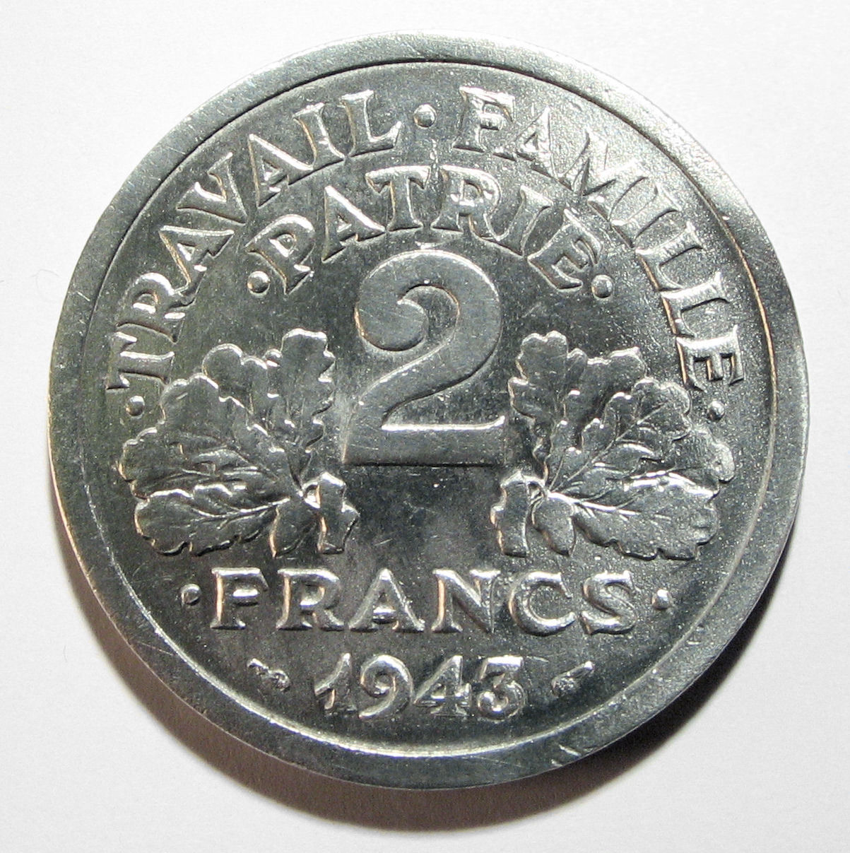 Pièce de monnaie 1943, deux francs, Travail Famille Patrie, État français, régime de Vichy. Valeur du franc 1943 = 0,20326 € 2006